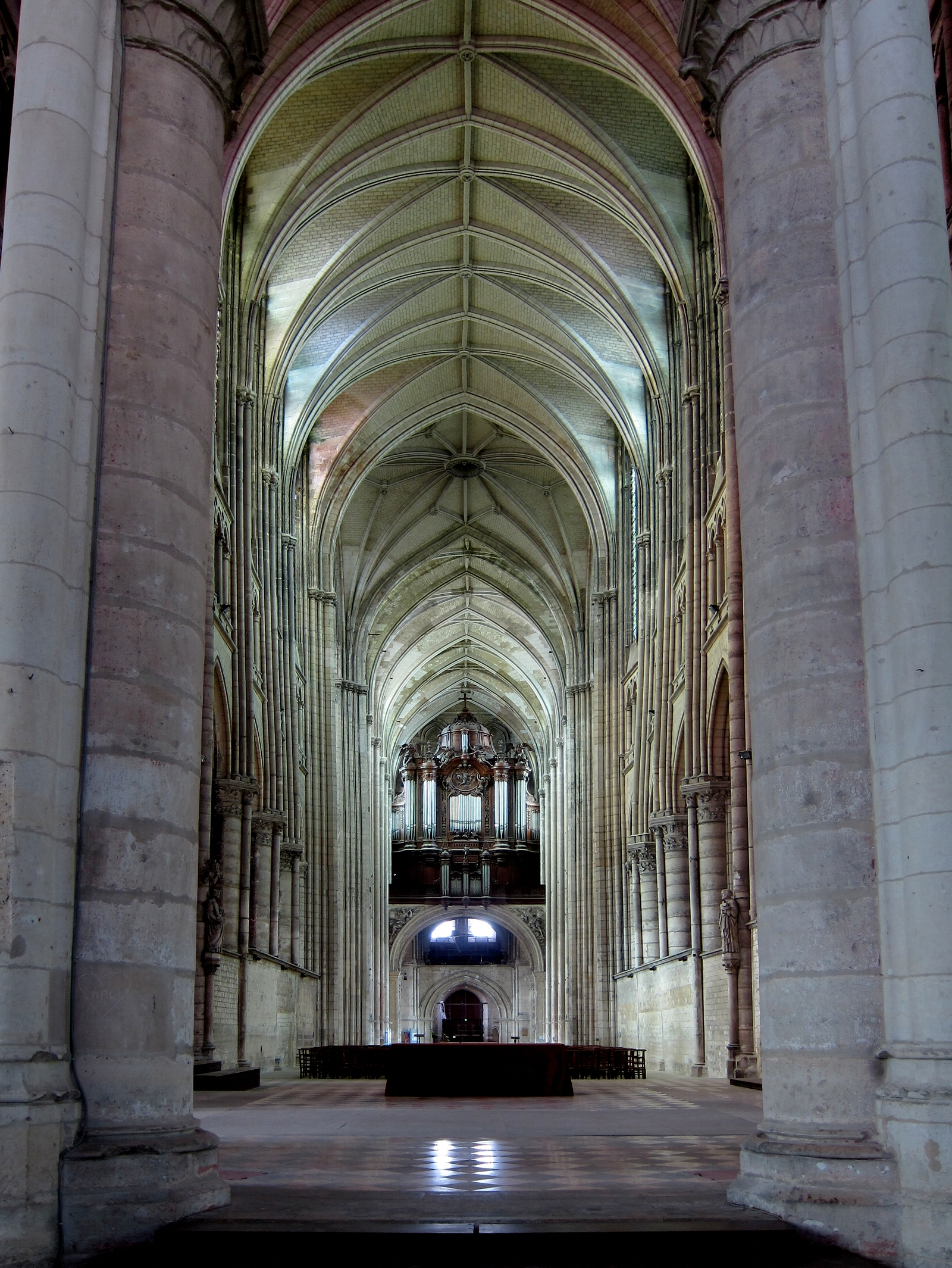 Vue de la basilique Saint-Quentin de Saint-Quentin (Aisne) depuis l'arrière du choeur.